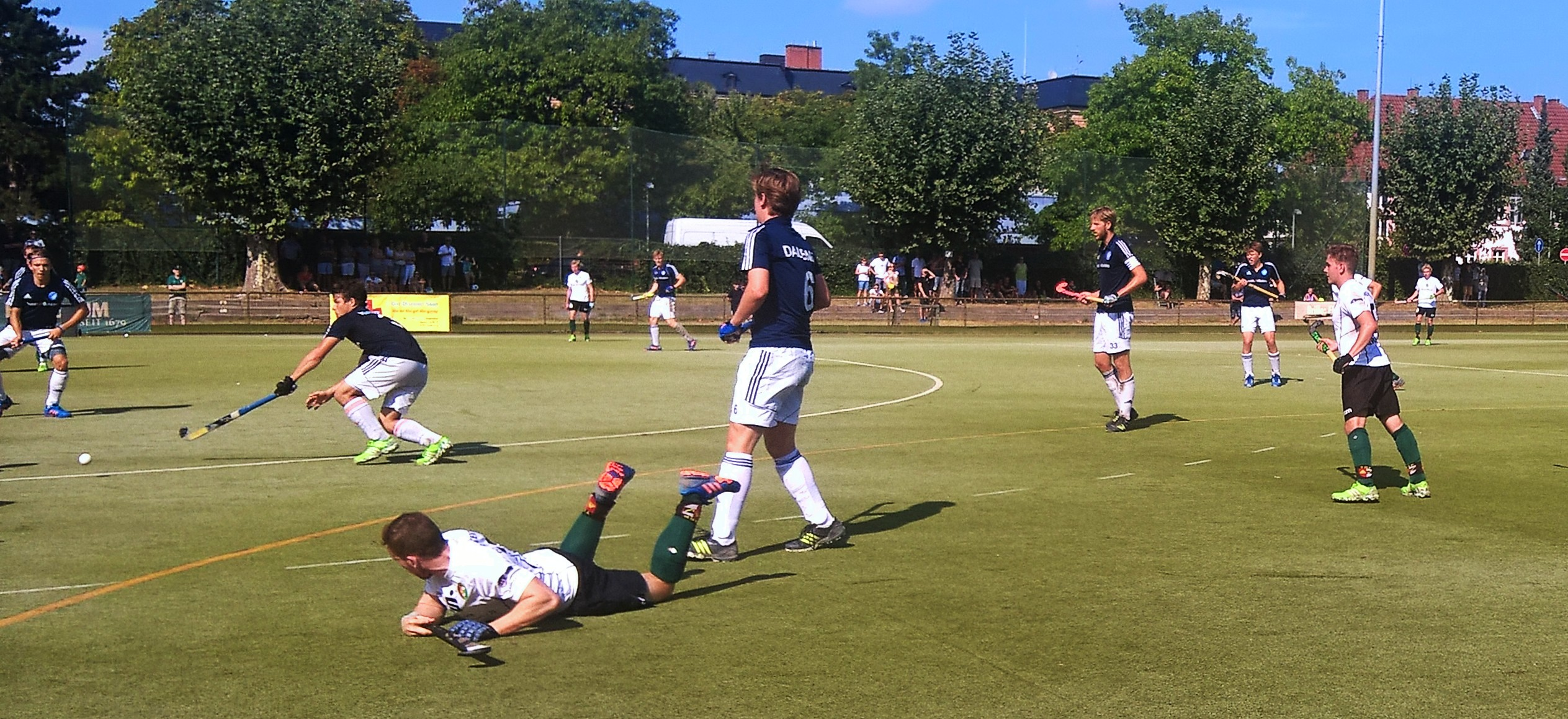 Das Stadion "Am Jahnplatz", Heimstätte der TG Frankenthal am 11. September 2016, Heimspiel gegen TC Blau-Weiß Berlin. Frankenthal in Weiß/Schwarz. Endergebnis Hockey II. Bundesliga 1:4